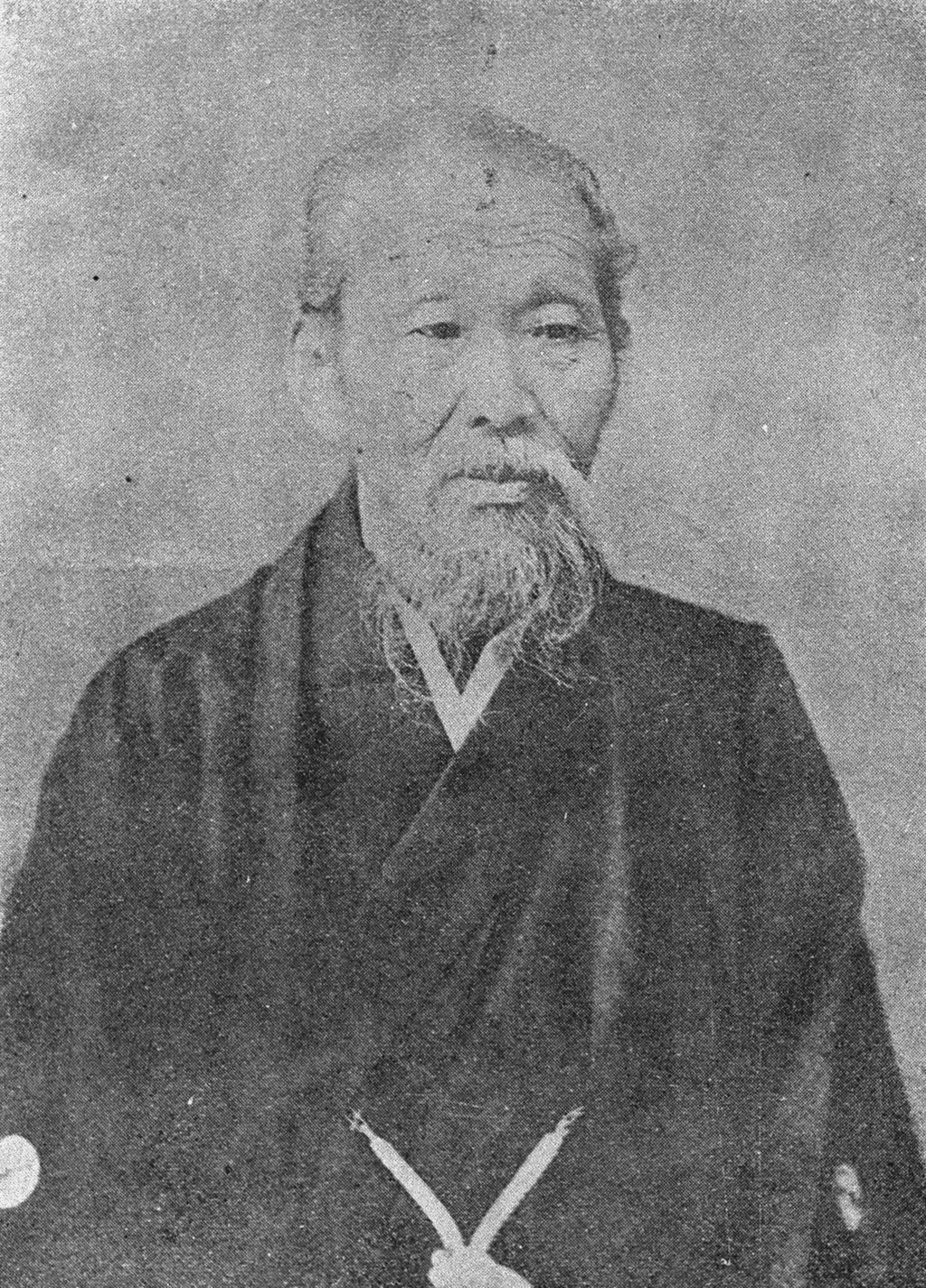 Portrait of Kumagai Naohiko (熊谷直彦, 1829 – 1913)